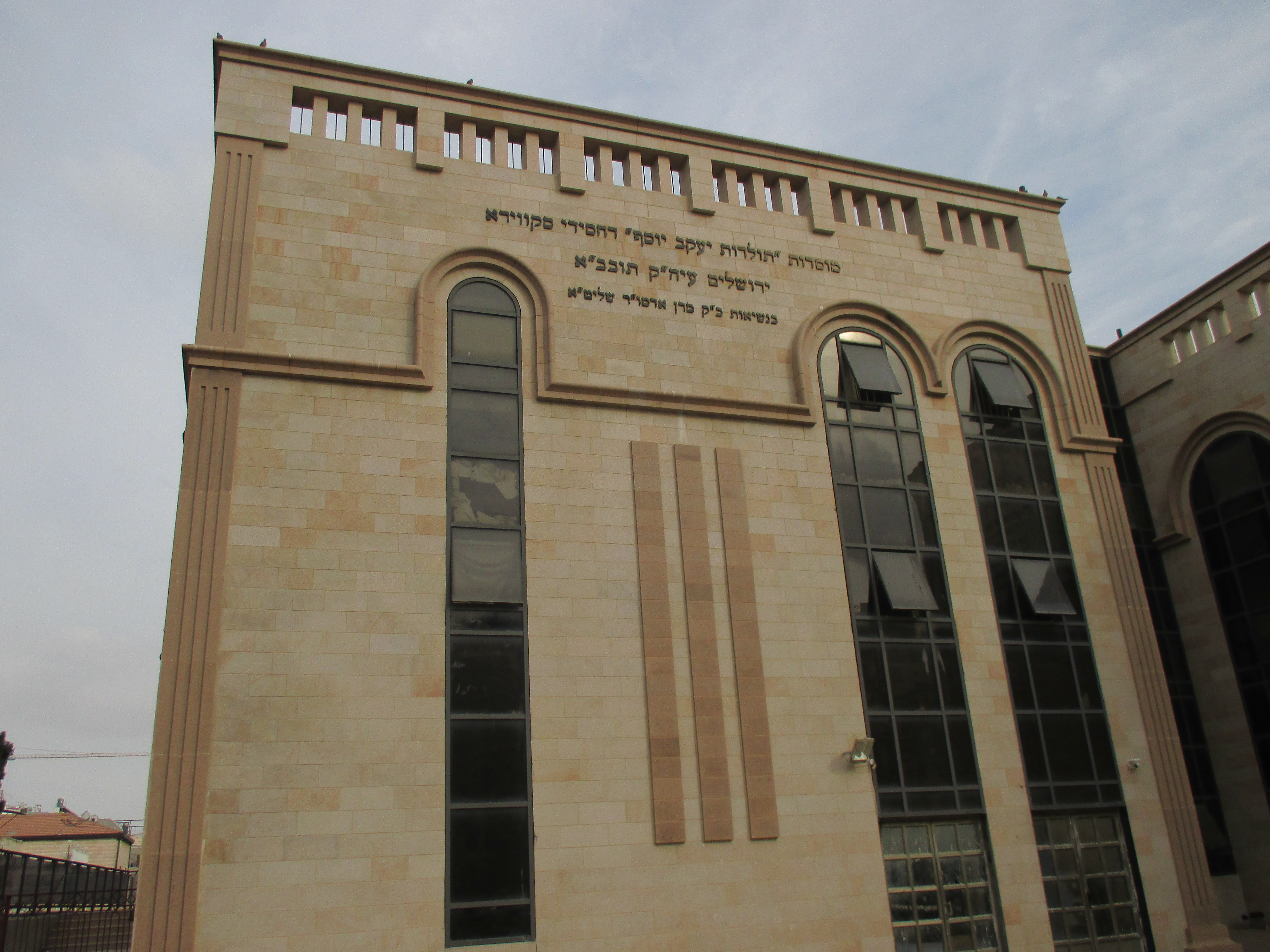 בית המדרש של חסידות סקווירה בשכונת מקור ברוך בירושלים